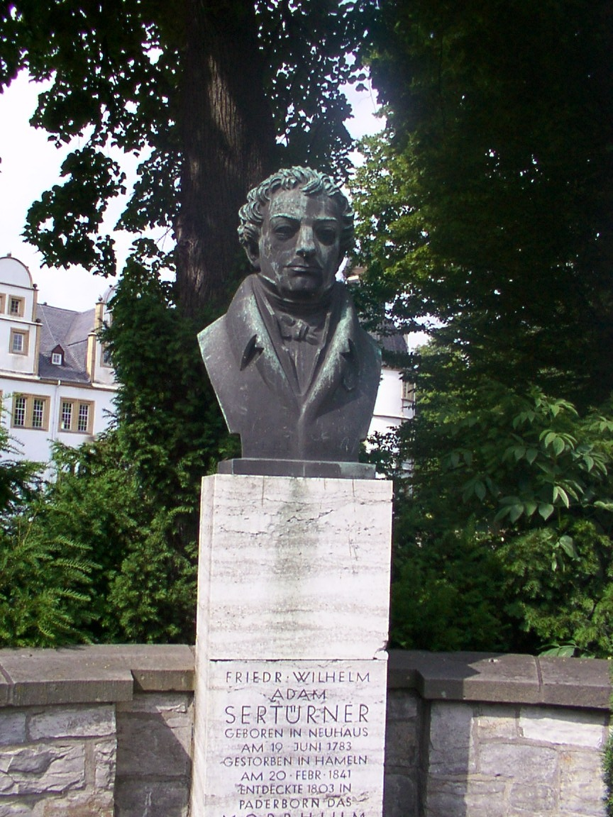 Büste des Friedrich Wilhelm Adam Sertürner vor dem Schlosspark in seinem Geburtsort Neuhaus.